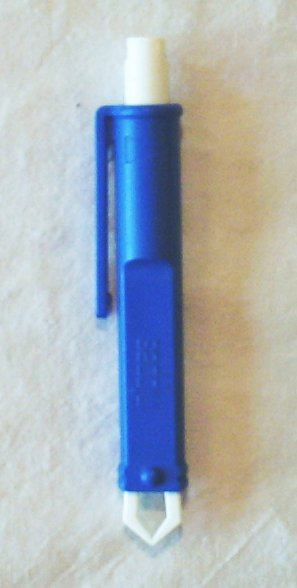 Tekenpincet - Foto zelf gemaakt en hierbij onder de GFDL geplaatst